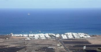 Arrieta, Insel Lanzarote